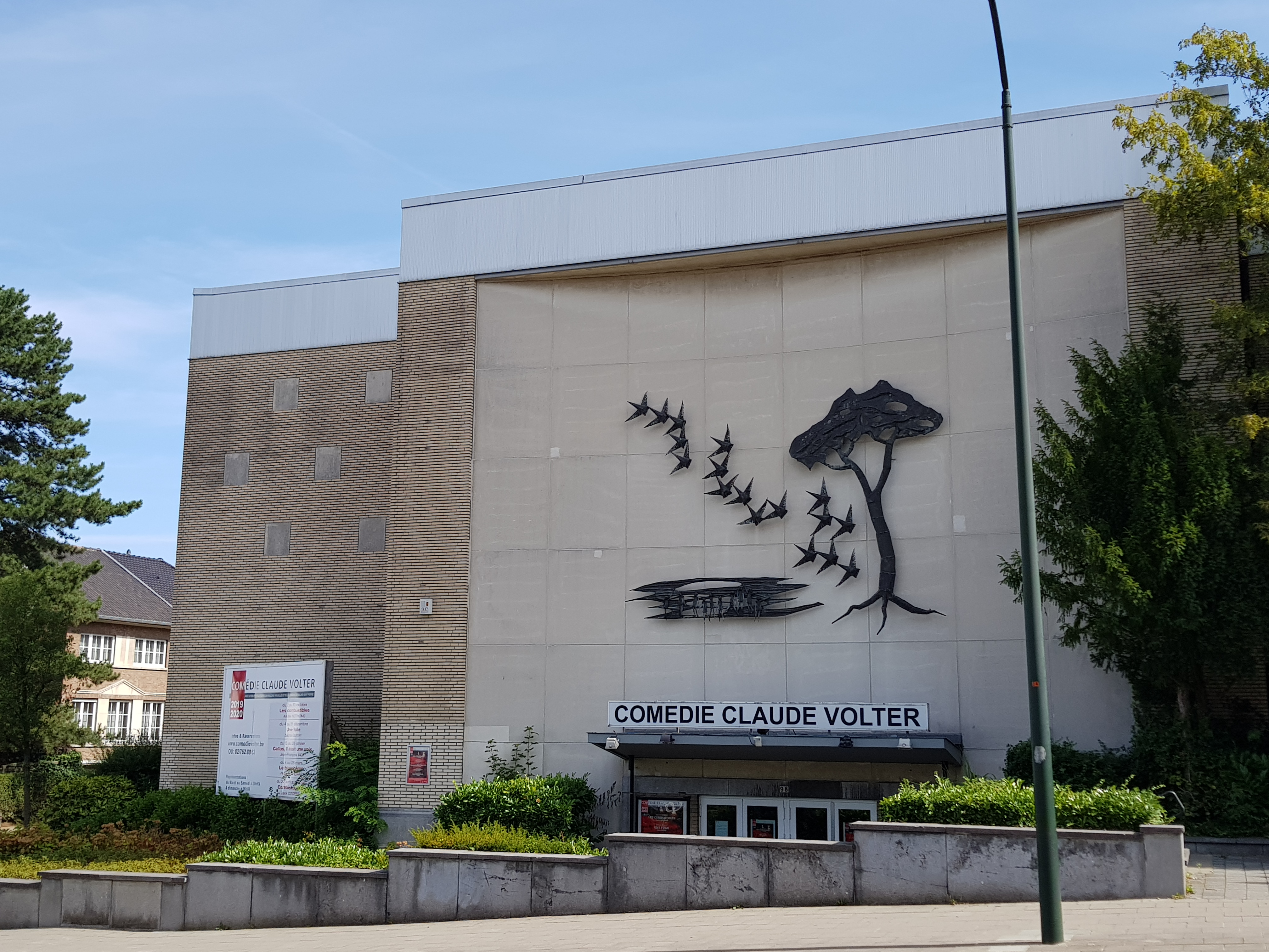 Comédie Claude Volter, Woluwe-Saint-Pierre, Bruxelles, Belgique.